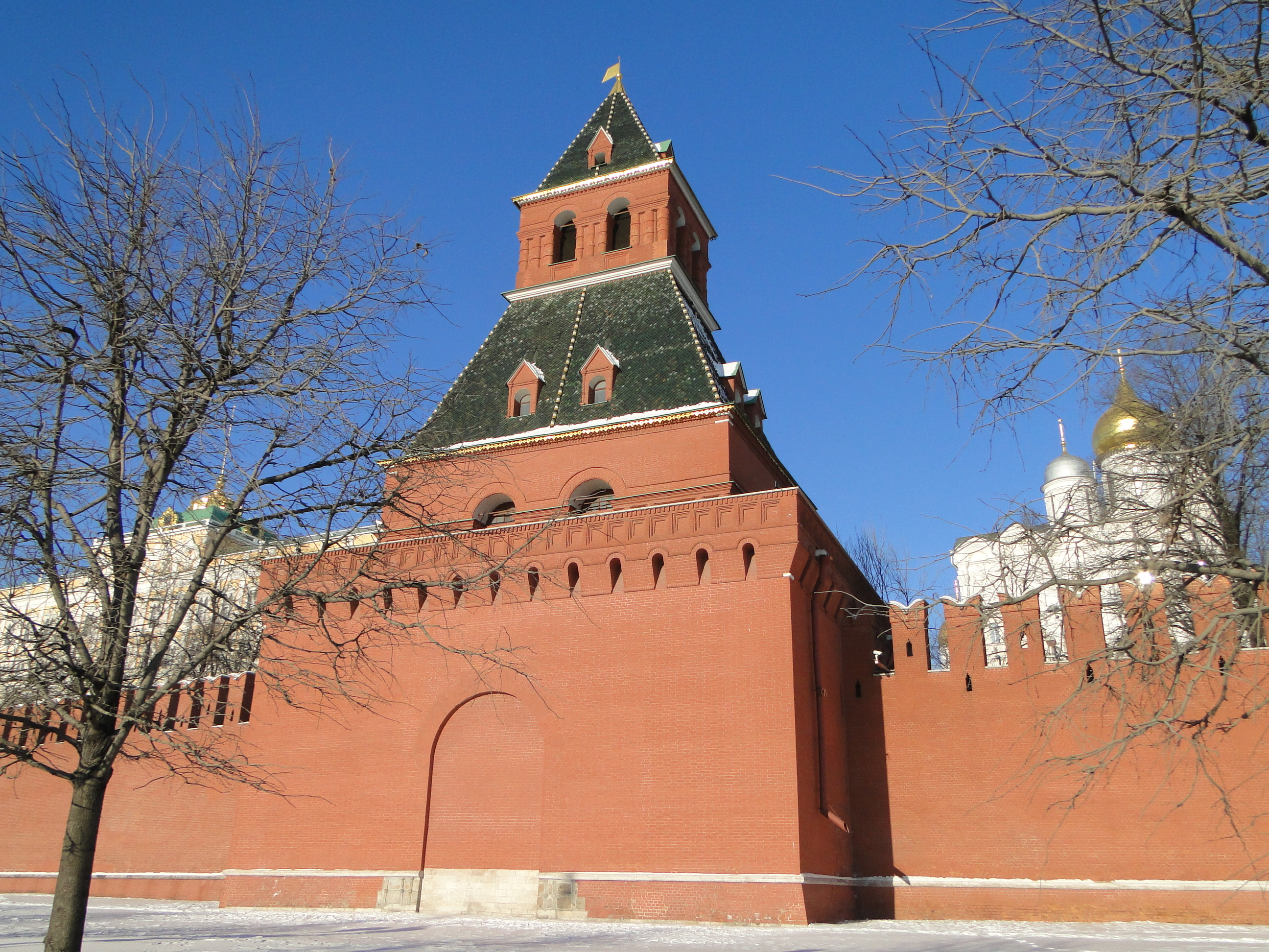 Тайницкая башня Московского кремля